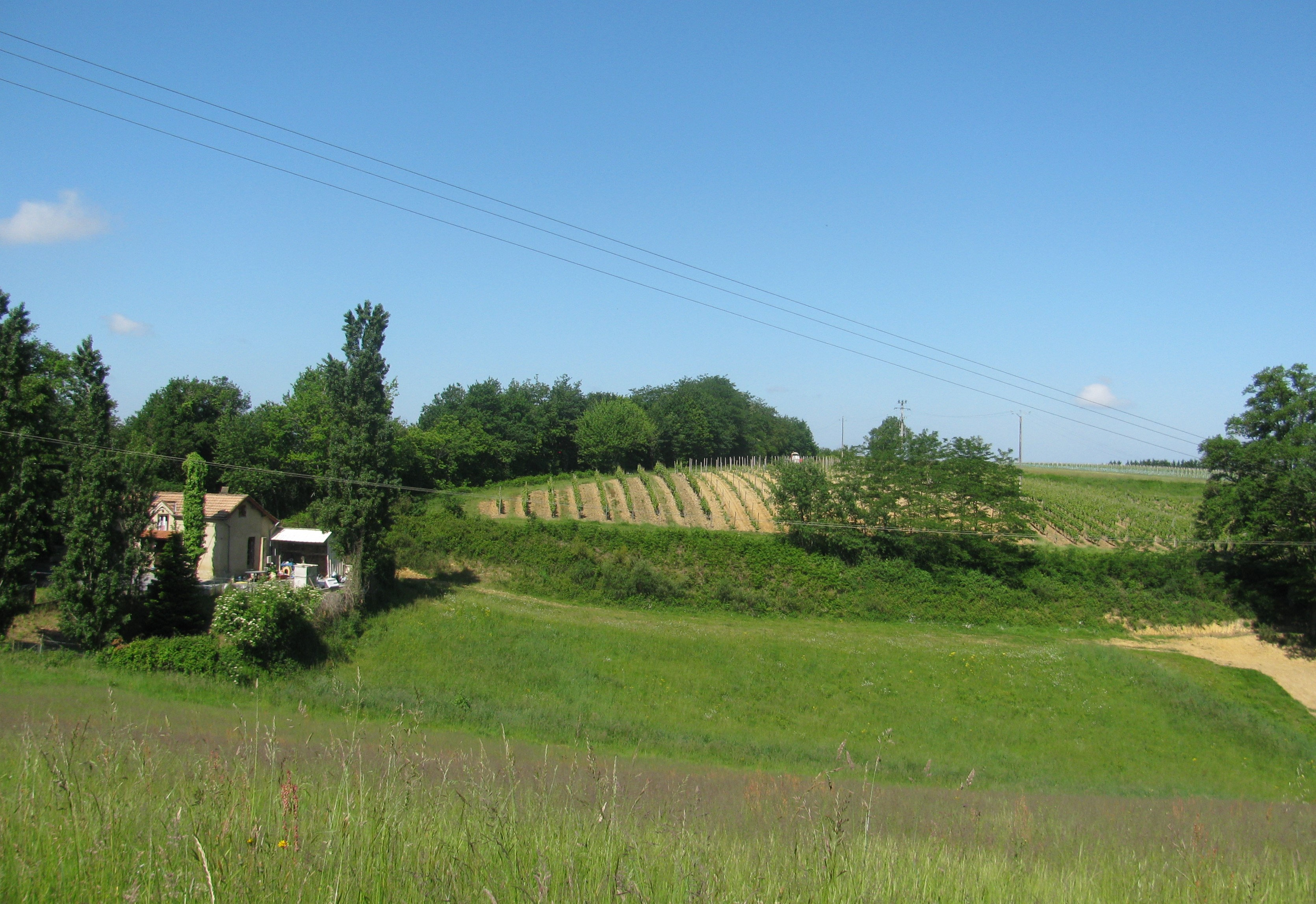 vignes à viella